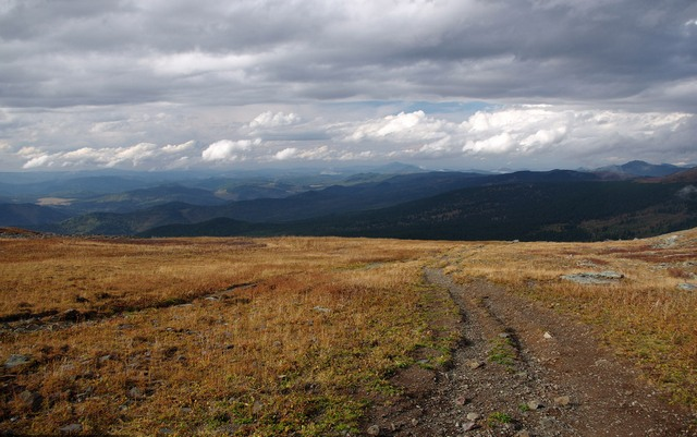 Вид на север с перевала Багаташ